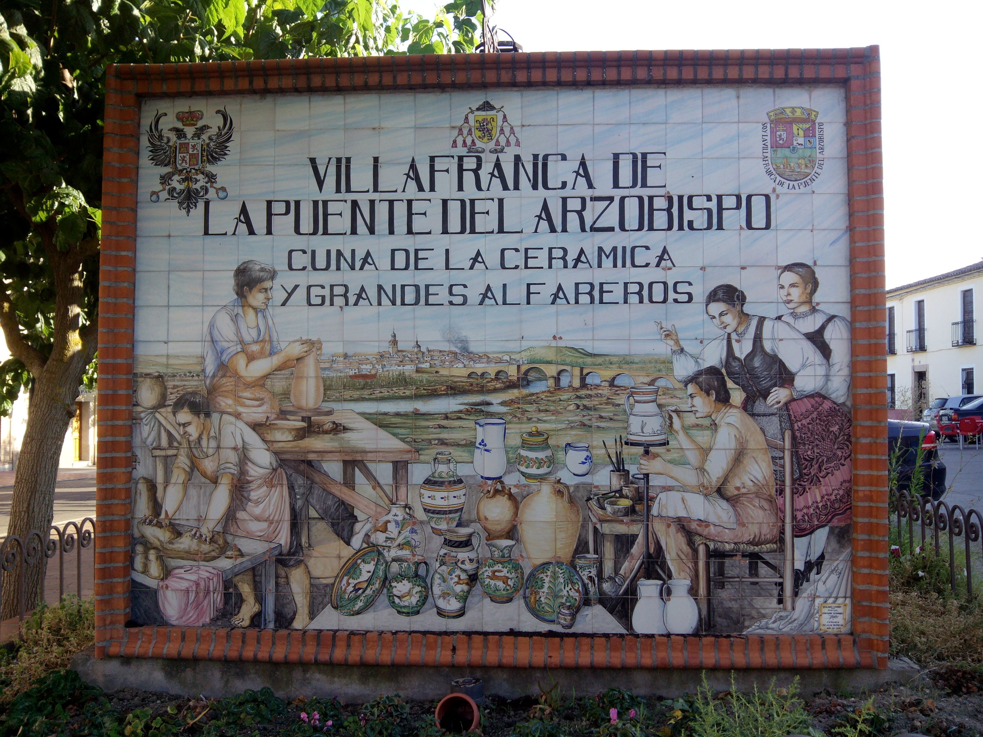 Mural de azulejería, de bienvenida a El Puente del Arzobispo, Toledo (España).